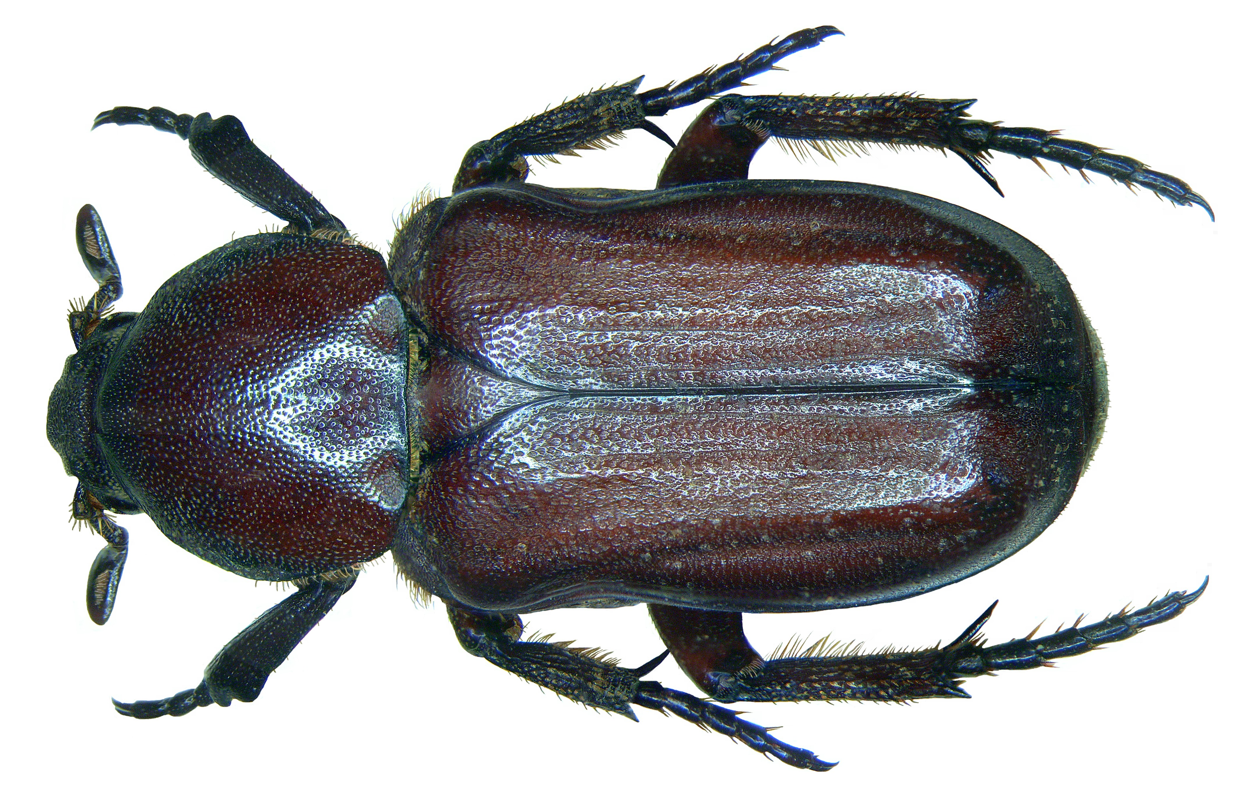 Familie: Scarabaeidae Grösse: 15,4-17 mm Verbreitung: Kenia, Südafrika Fundort: Kenia, Massai Mara Reservat leg. det. U.Schmidt, 1990 Foto: U.Schmidt, 2008